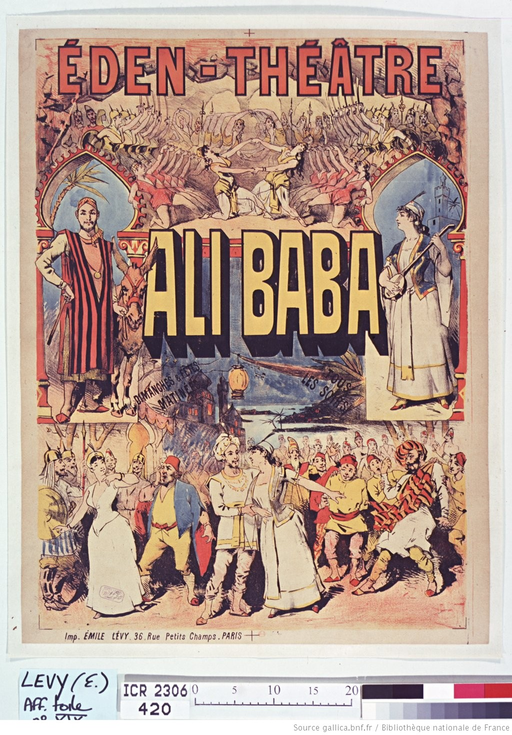 Titre : Eden-Théâtre. Ali-Baba... : [affiche] / [Non identifié] Éditeur : [s.n.][s.n.] Date d'édition : 1890 Sujet : Opérettes Sujet : Théâtre lyrique (genre) Sujet : Spectacles et divertissements divers Type : image fixe Langue : français Langue : language.label.français Format : 1 est. : lithographie, coul. ; 0,80 x 0,60 m Format : image/jpeg Format : Nombre total de vues : 1 Description : Affiche Droits : domaine public Identifiant : ark:/12148/btv1b90080906 Source : Bibliothèque nationale de France, ENT DN-1 (LEVY,Emile/19)-FT6 Notice du catalogue : Provenance : Bibliothèque nationale de France Date de mise en ligne : 18/04/2011